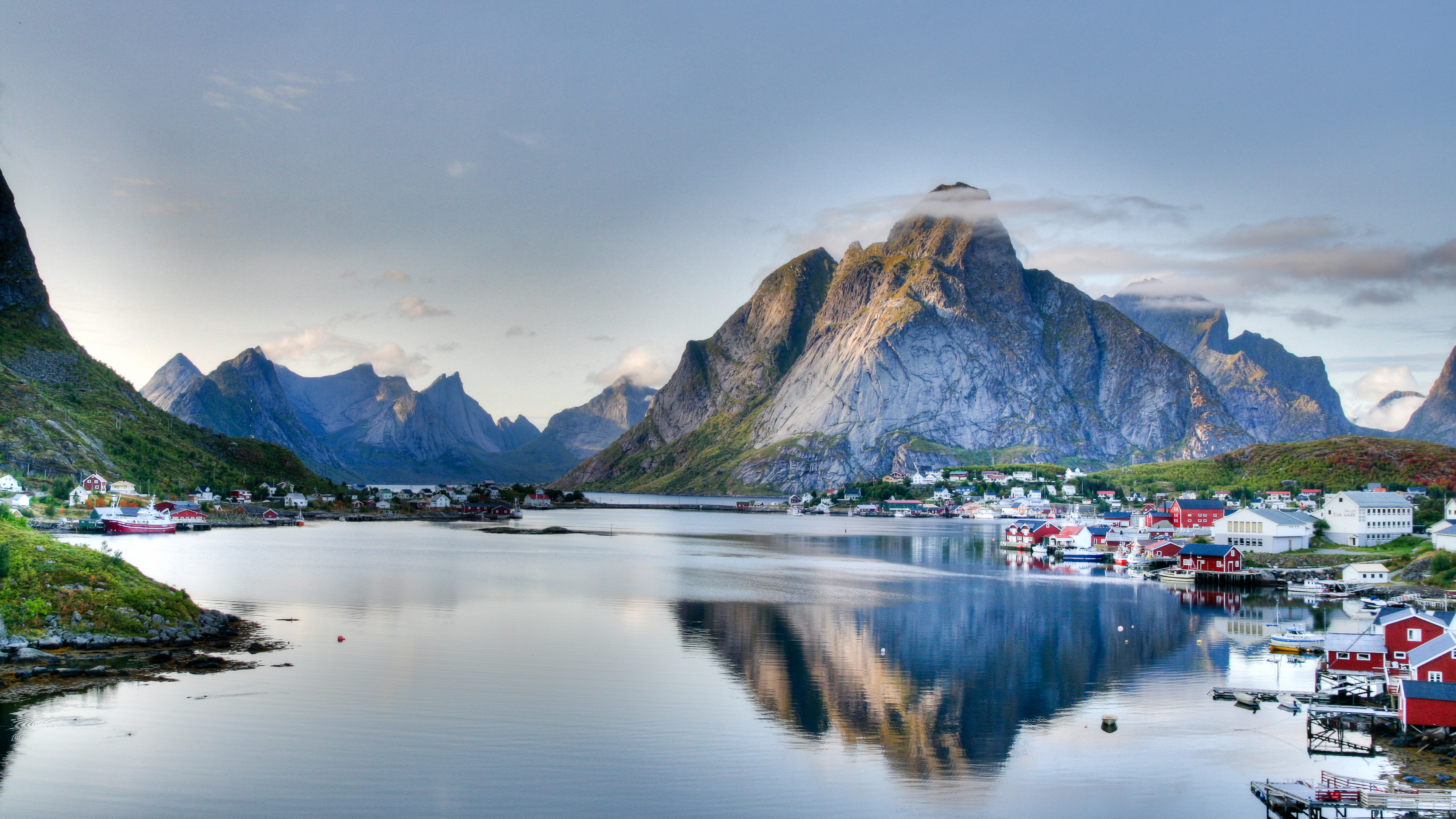 Reine